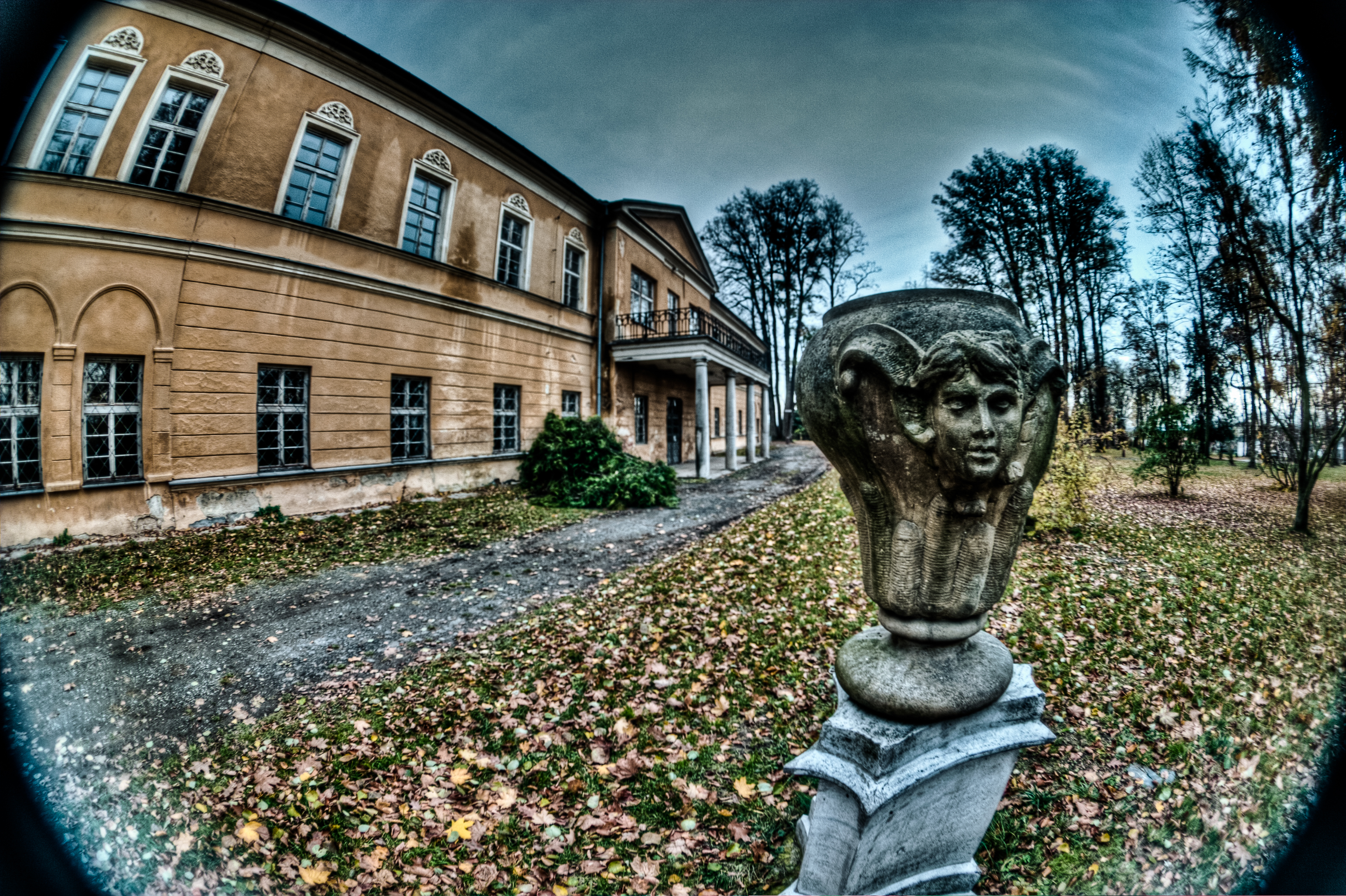 Zámek Neplachovice, Neplachovice 81